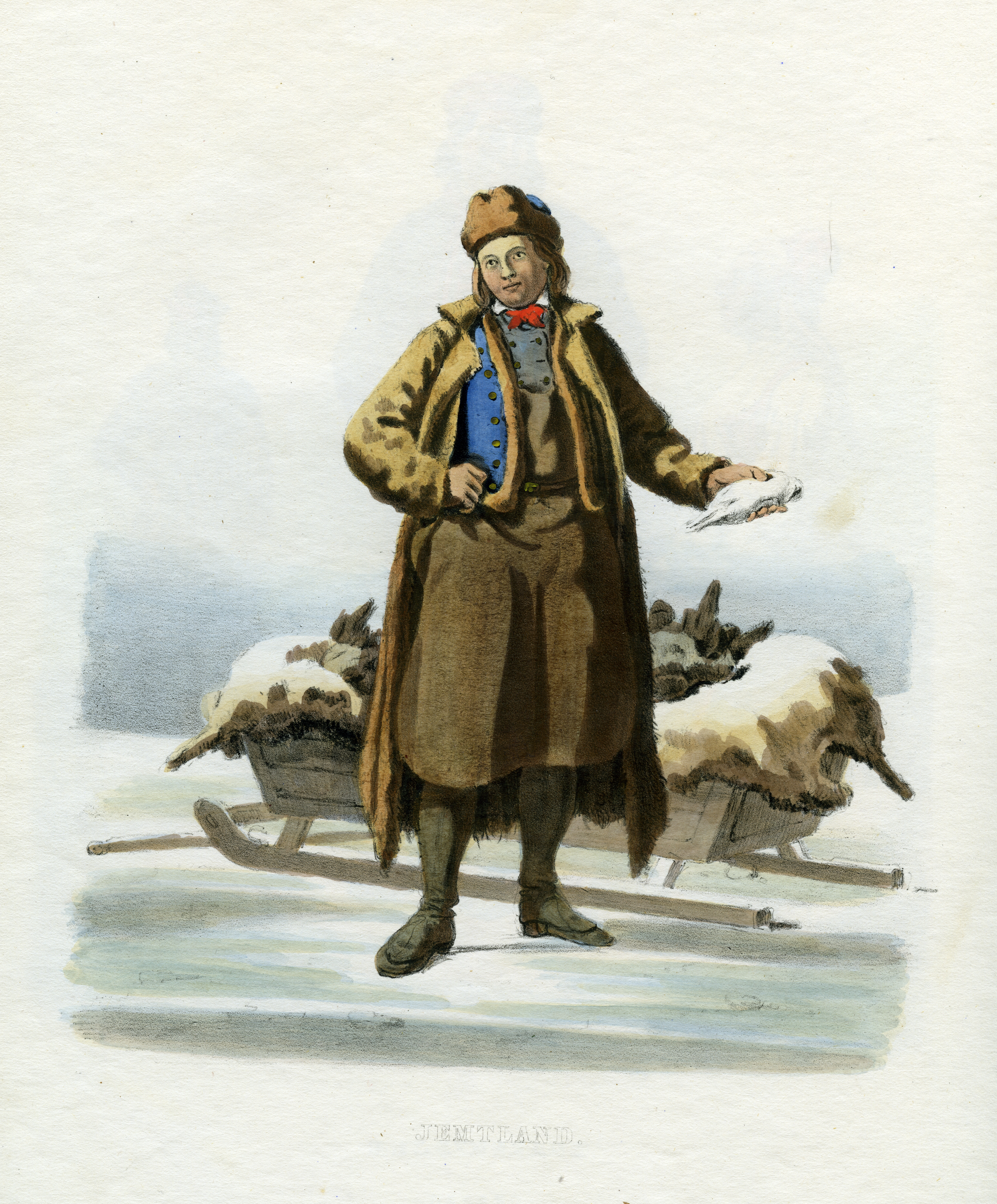 Folkdräkt från Jämtland, Sverige. Plansch ur Svenska folkets seder, bruk och klädedrägter (1863) tecknad av Carl Anders Dahlström.